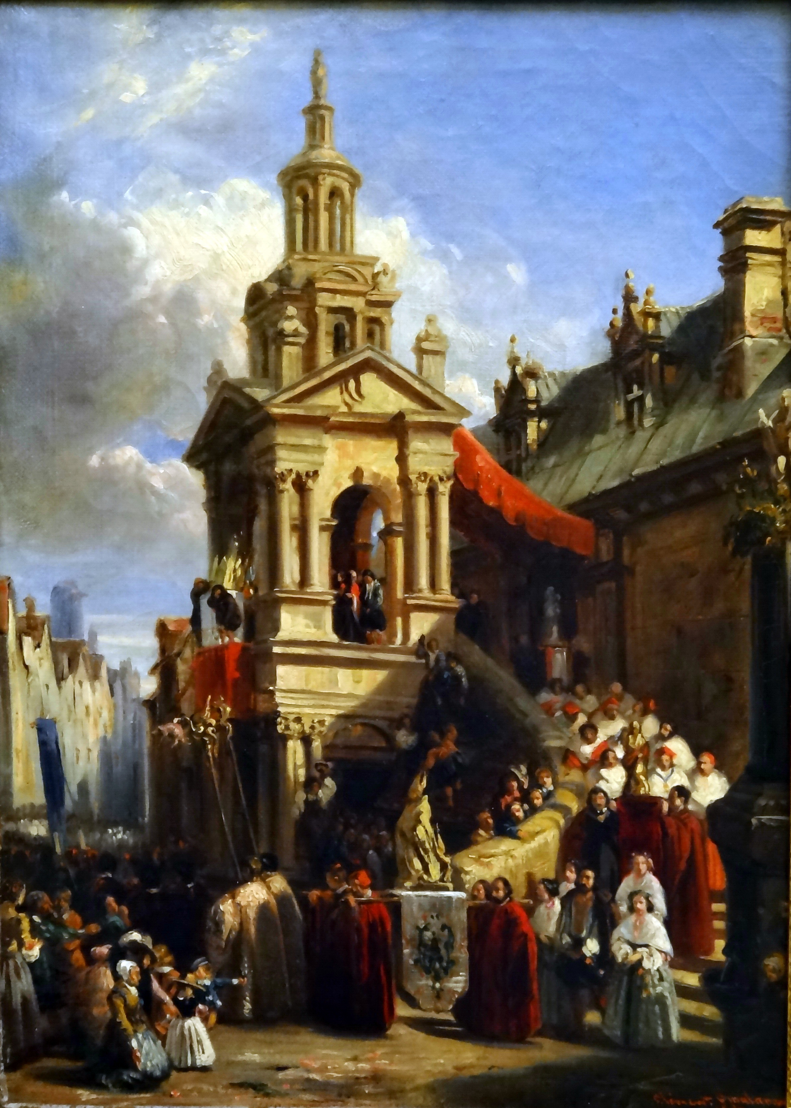 Ежегодное торжественное шествие с мощами святого Ромена, покровителя Руана.